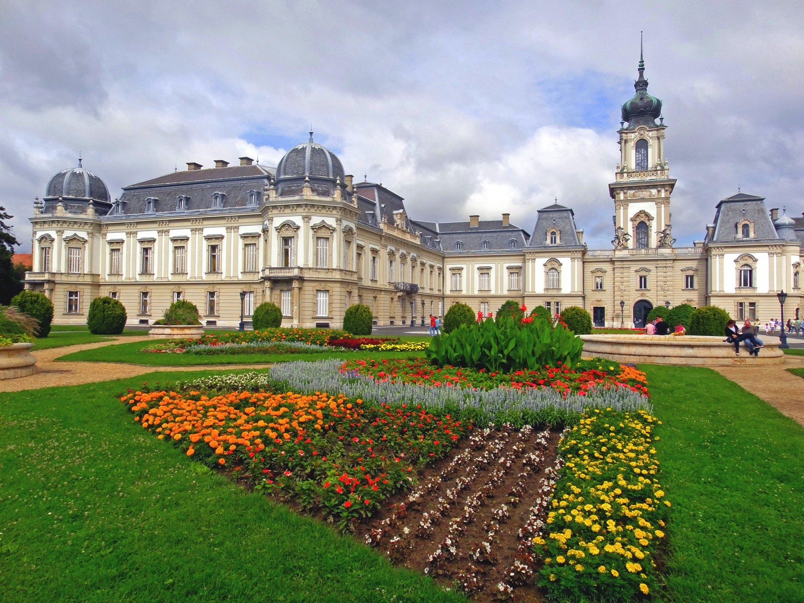 Festetics-kastély (Keszthely, Kastély u. 1 .) This is a photo of a monument in Hungary. Identifier: 10876